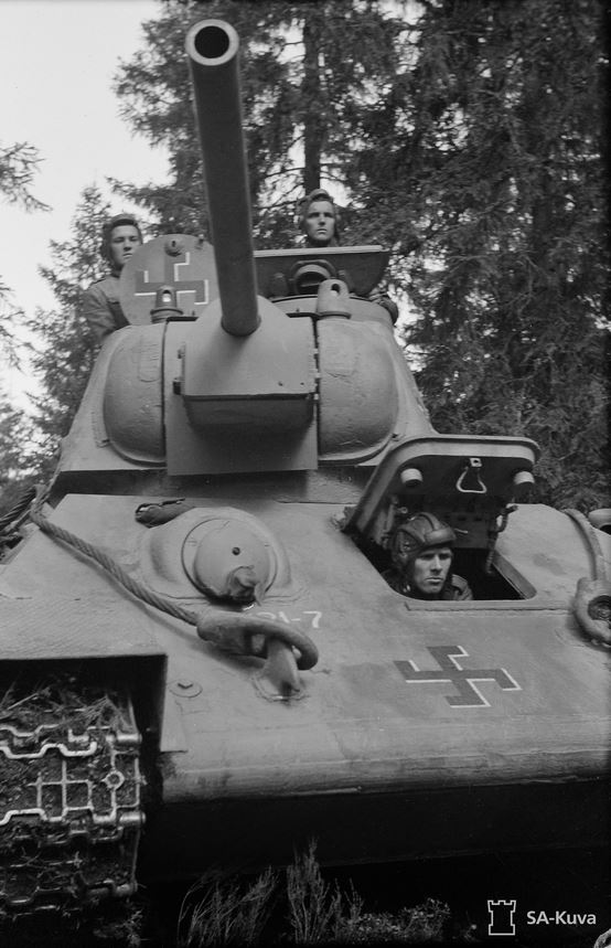 Sotka (T-34) -vaunu valmiusasemassa. Vaunun ajajana on Mannerheim-ristin ritari Lauri Heino 22.7.1944